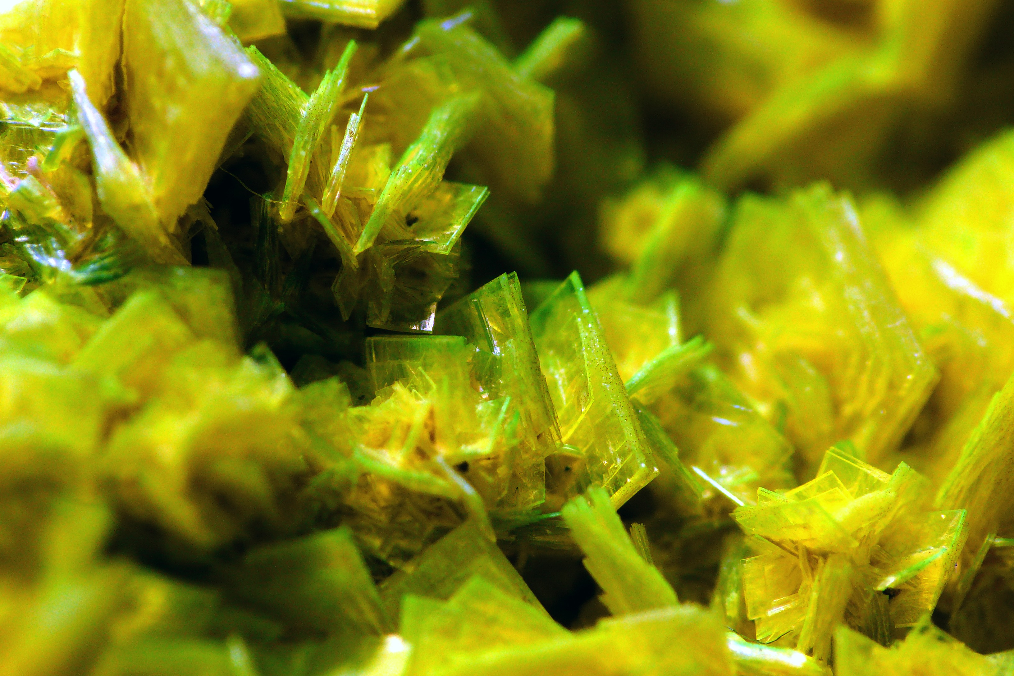 Autunit aus der Assunçao Mine, Aldeia Nova, Ferreira de Aves Sátão, Portugal